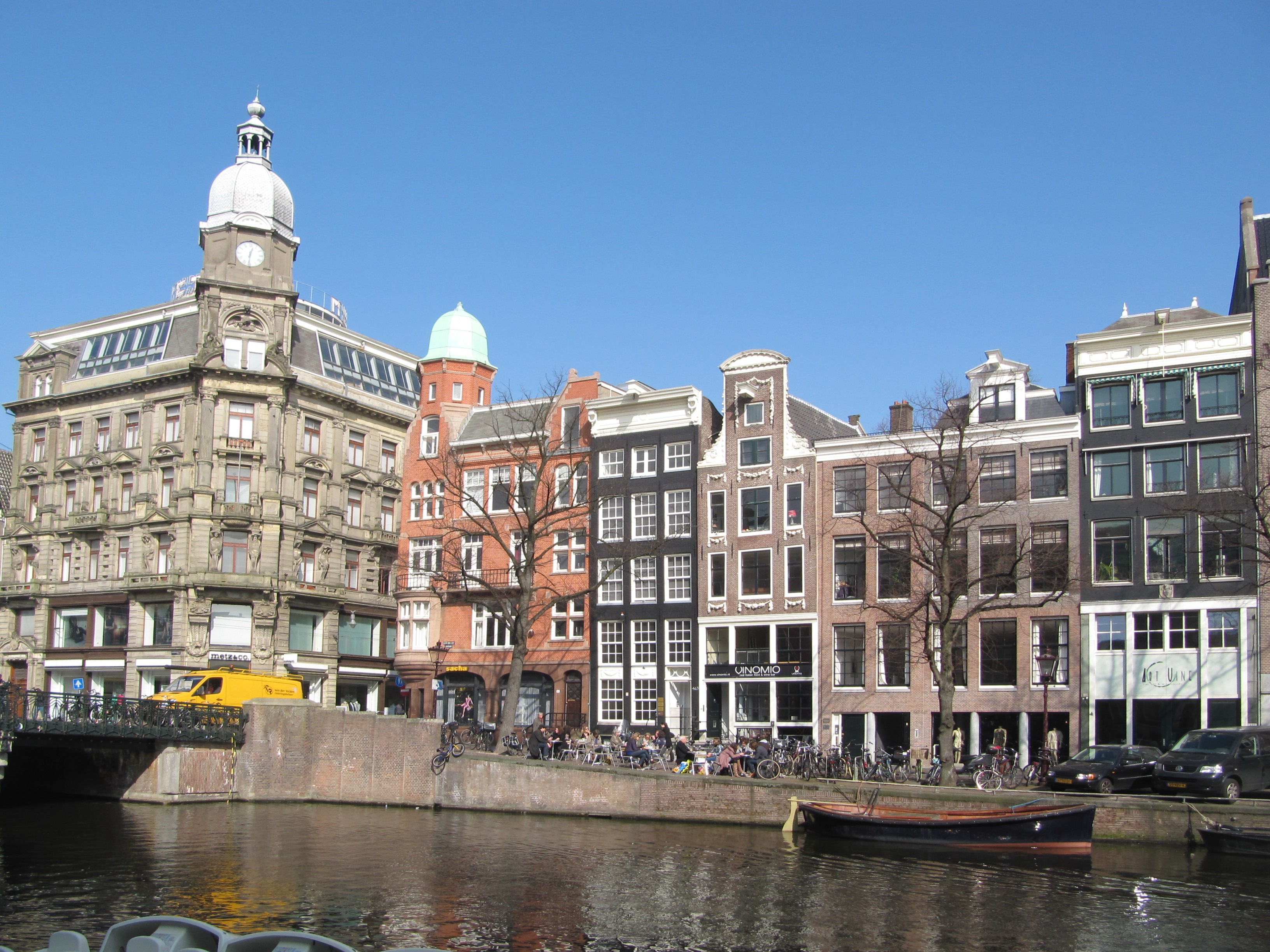 RM2361 RM2364 Keizersgracht 463-471.jpg